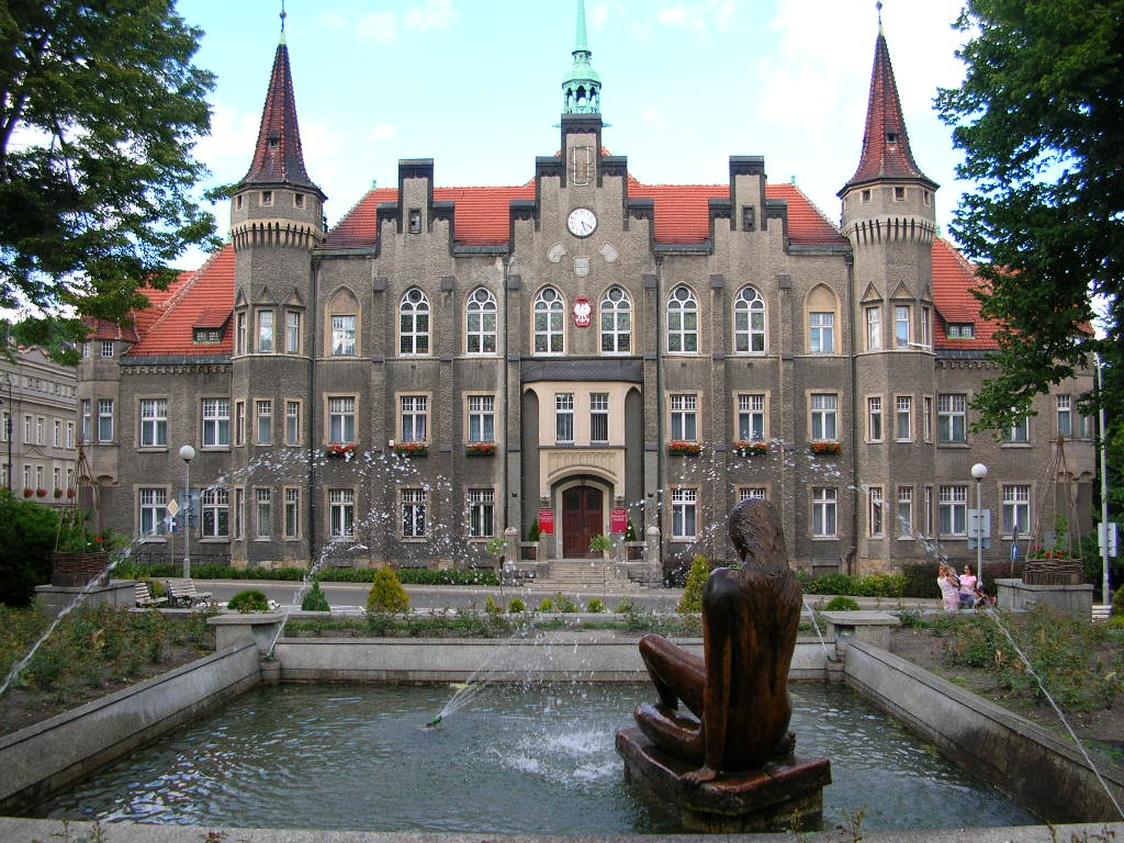 Wałbrzych - zabytkowy ratusz miejski.